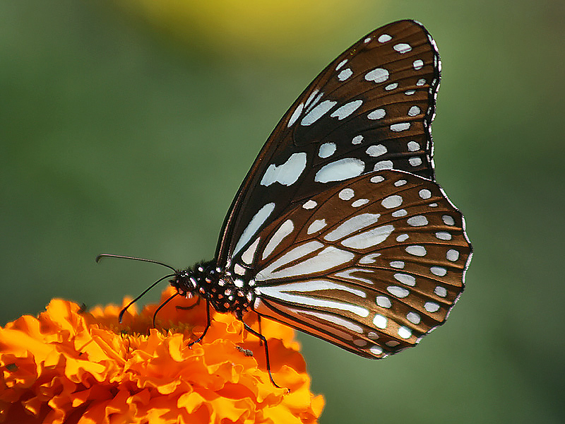 Blue tiger Tirumala limniace in Kolkata, West Bengal, India.